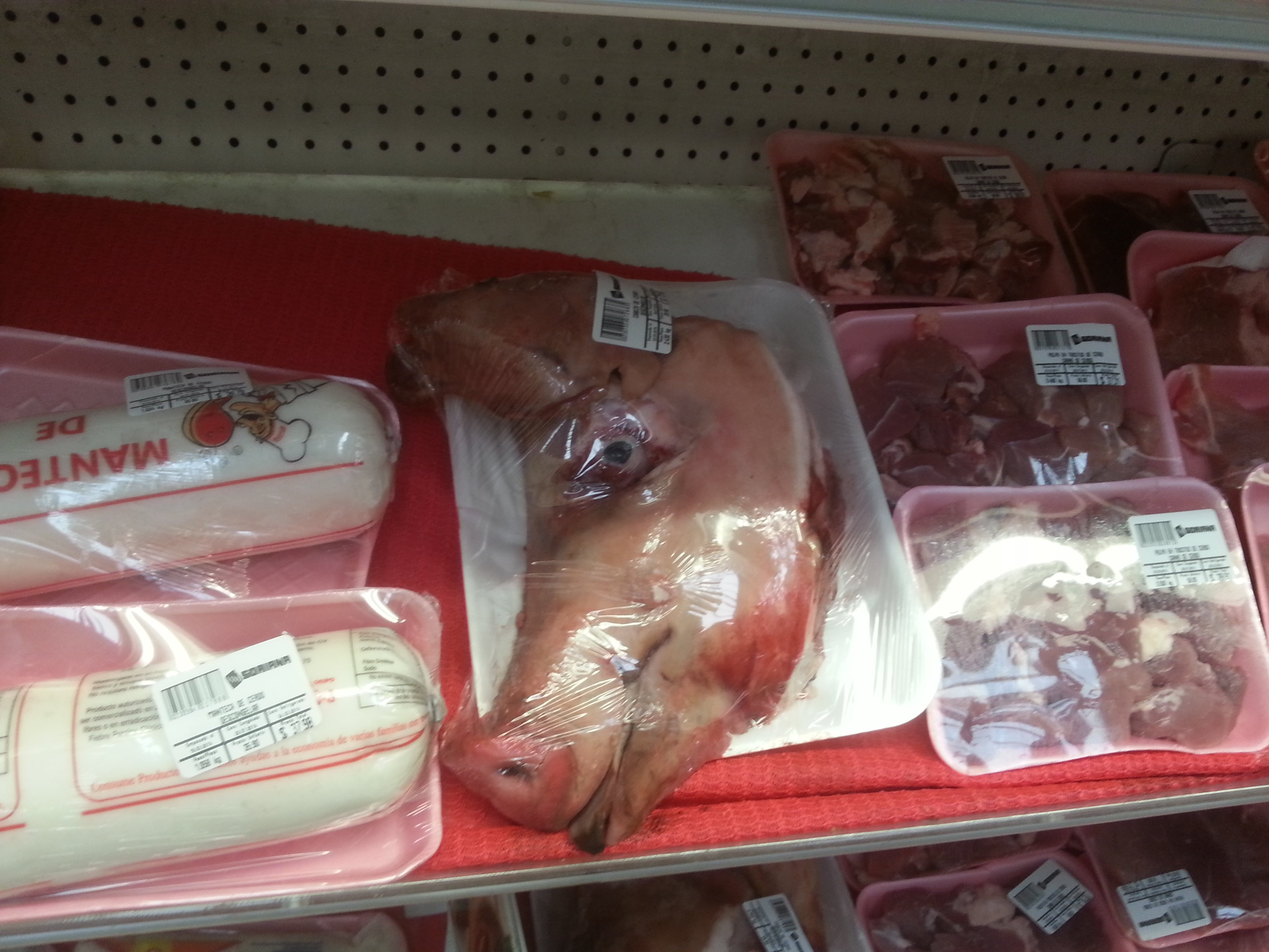 나 이제 돼지고기 안먹을란다